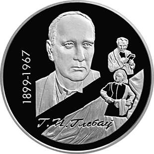 Беларуская (тарашкевіца): Памятная манэта, прысьвечаная 100–годзьдзю з народзінаў Г. Глебава